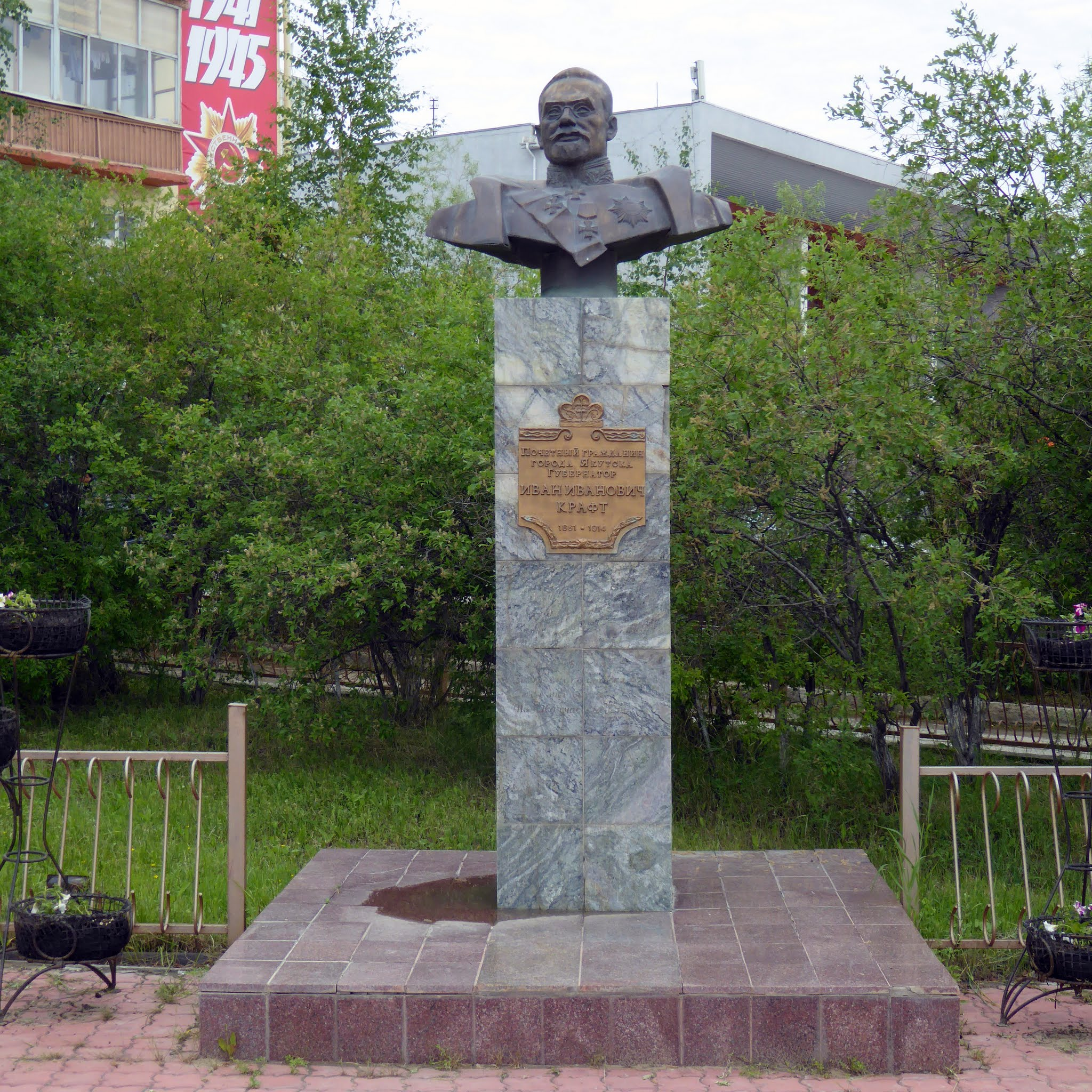 Памятник И.И. Крафту, Якутск Иван Иванович Крафт